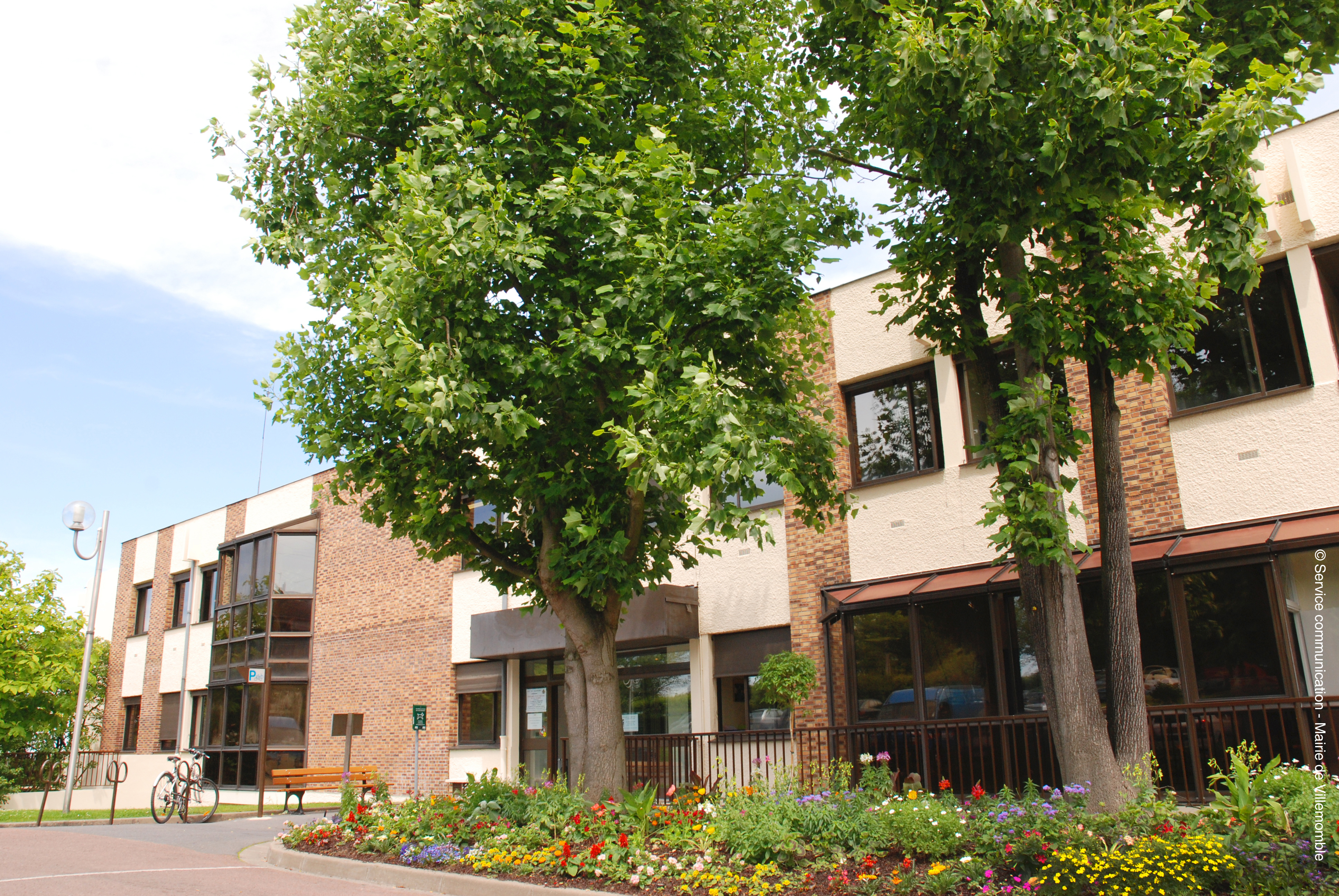 Bâtiment public